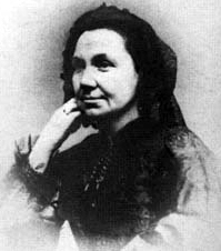 Jenny d'Héricourt (1809-1875)